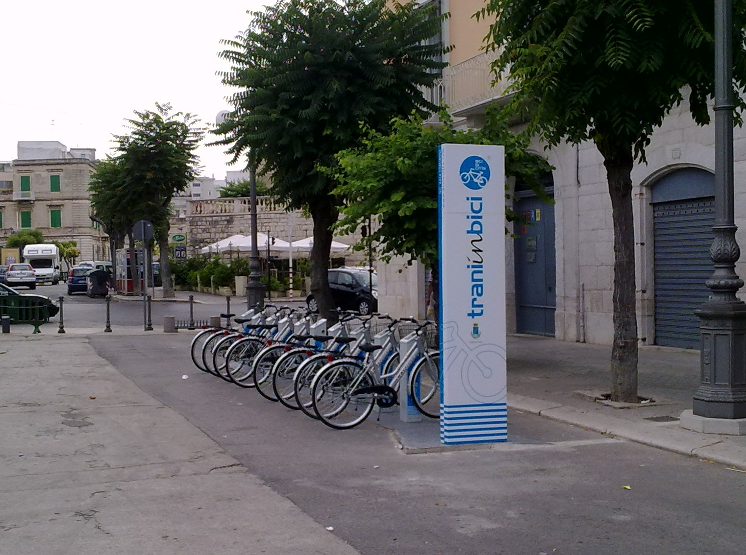 Bike_sharing_trani